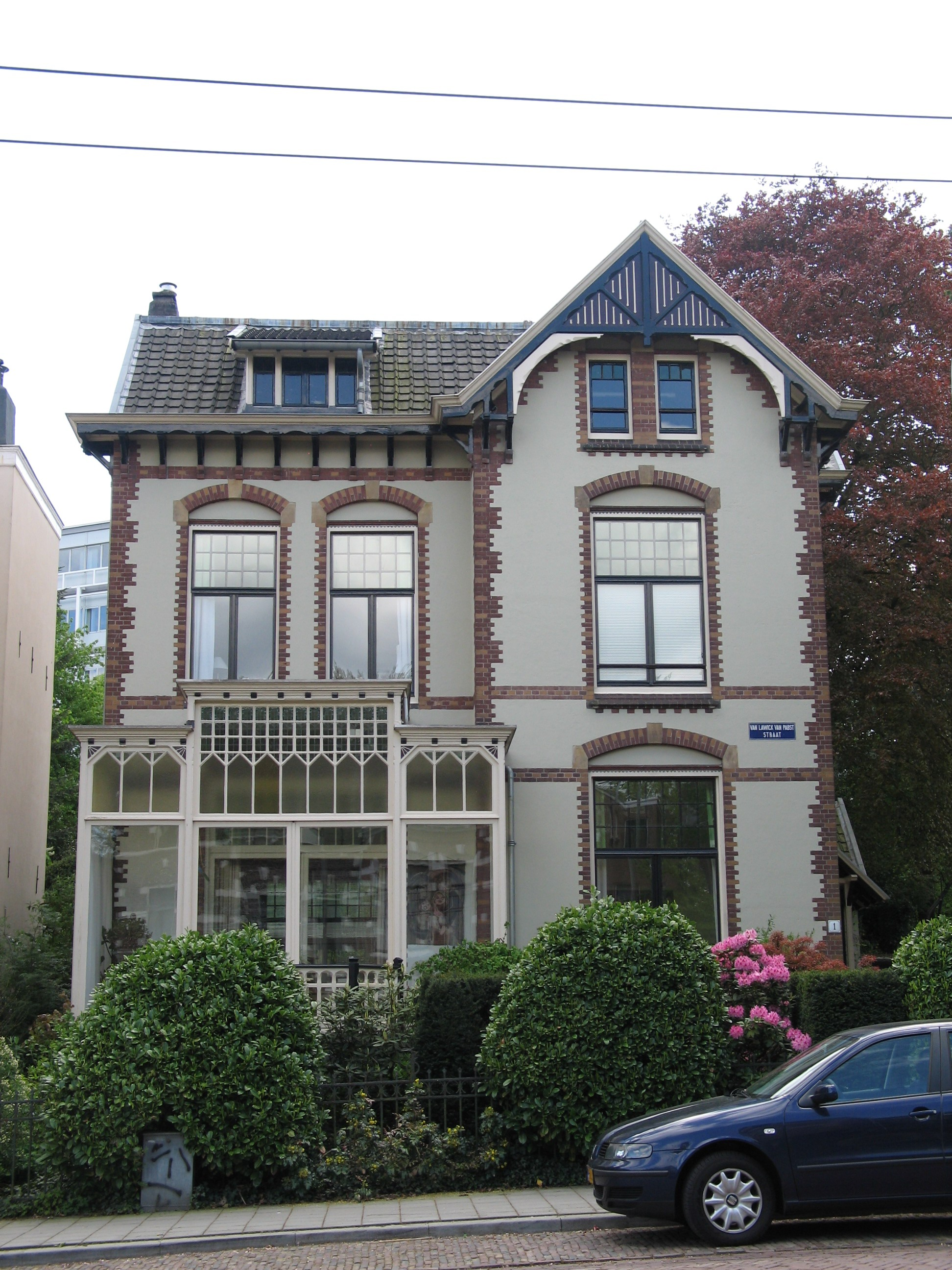 Huis gebouwd in Art Nouveau stijl.